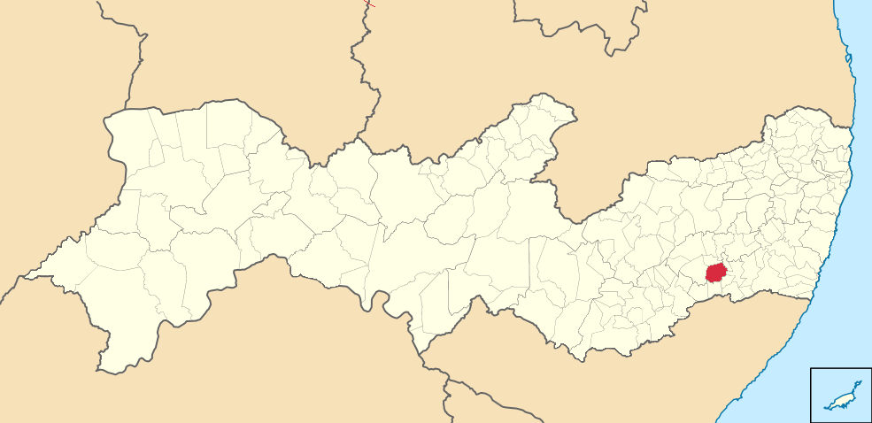 Mapa de Lagoa dos Gatos (2)